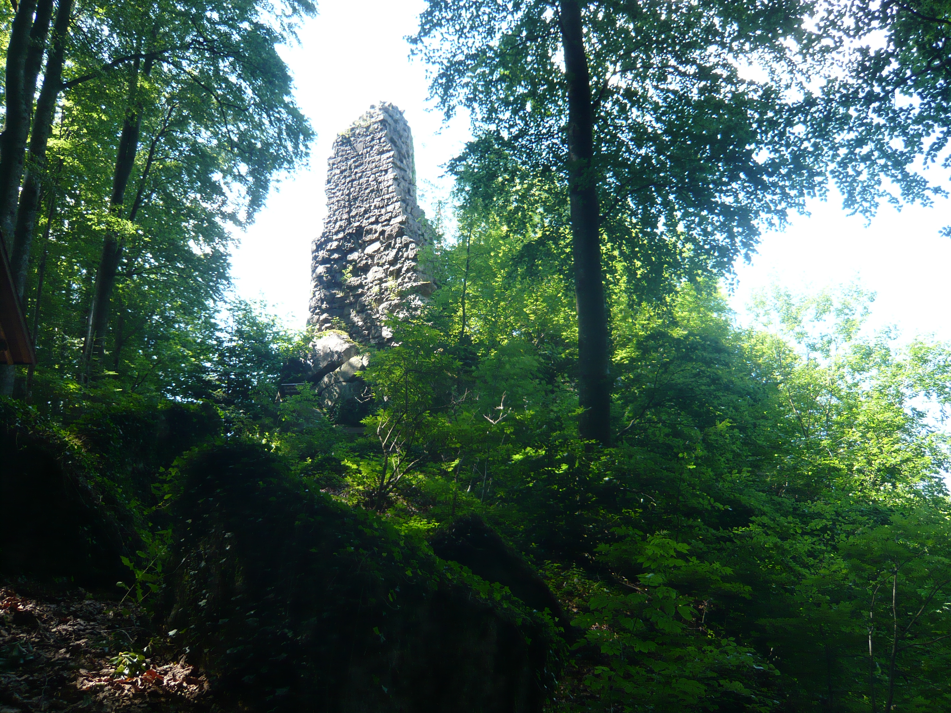 Burg Hohenrod, bei Sasbachwalden, von Osten her gesehen